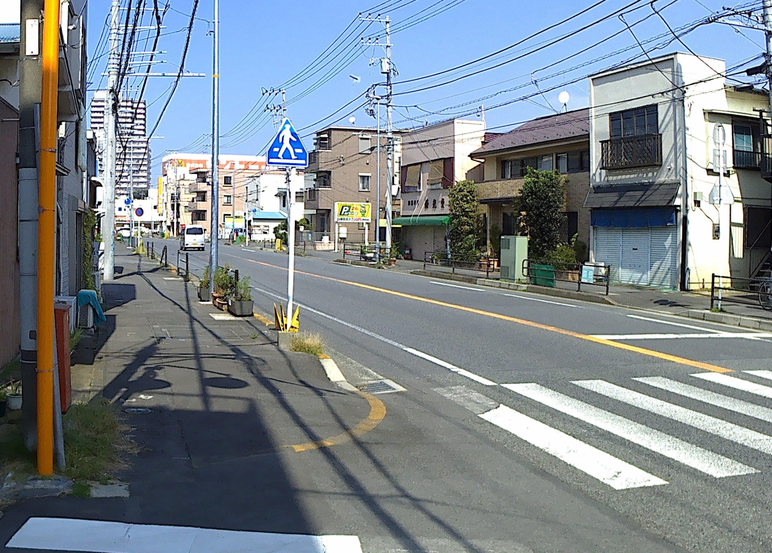 神奈川県厚木市幸町 厚木宿内の県道６０１号線北方を望む